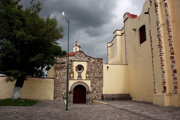 Exconvento de San Francisco de Asís, Tepeji del Río, Hidalgo. Camino Real de Tierra Adentro: Patrimonio Mundial de la Humanidad. Monasterio fundado en 1558; Su templo presenta una fachada sobria y elegante del más puro estilo renacentista. Su atrio está rodeado por muros almenados y conserva dos capillas posas y una capilla abierta, ricamente decoradas. El claustro, en regular estado de conservación, está formado en sus dos niveles por arcos rebajados.